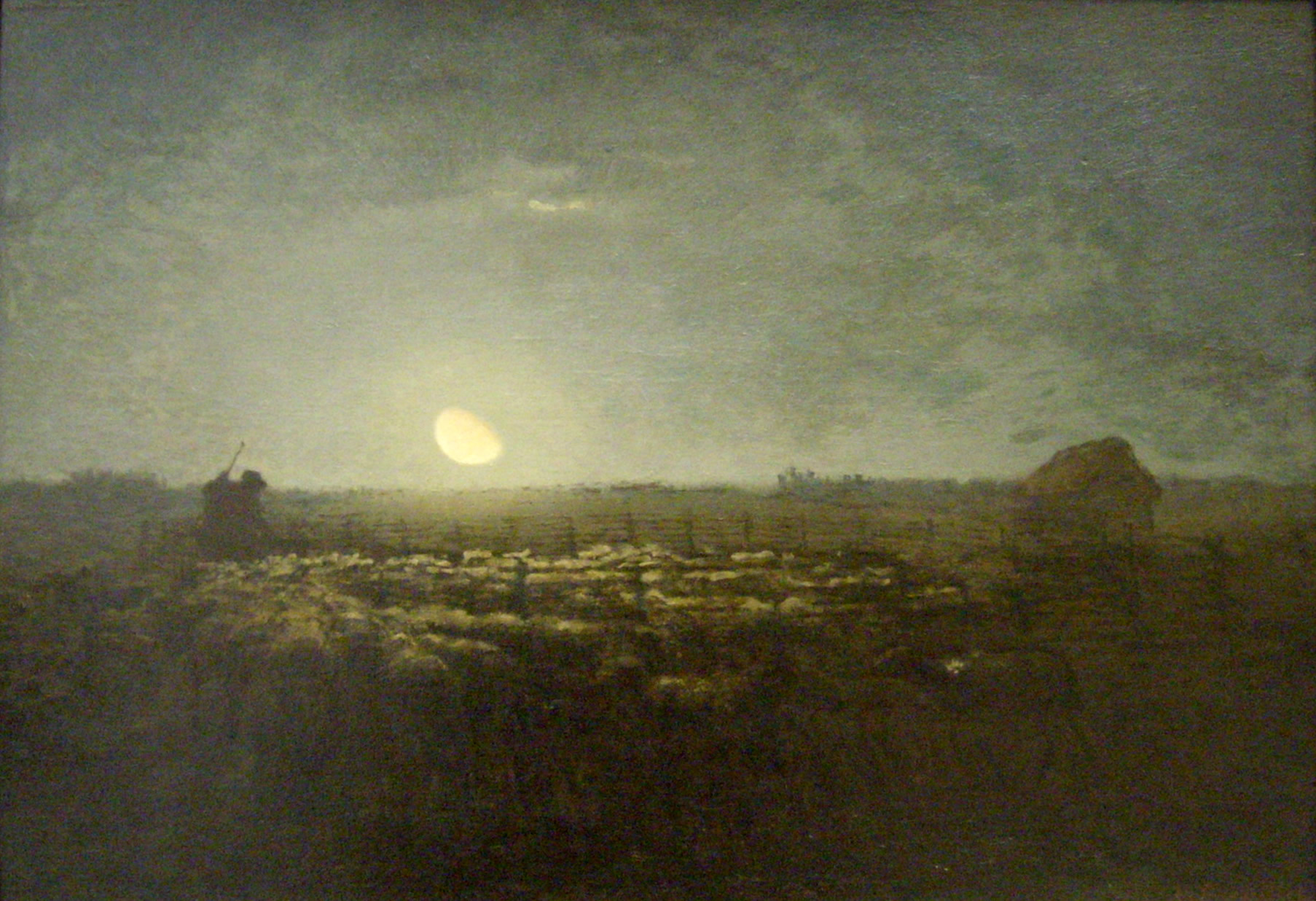 Le parc à moutons, clair de lune